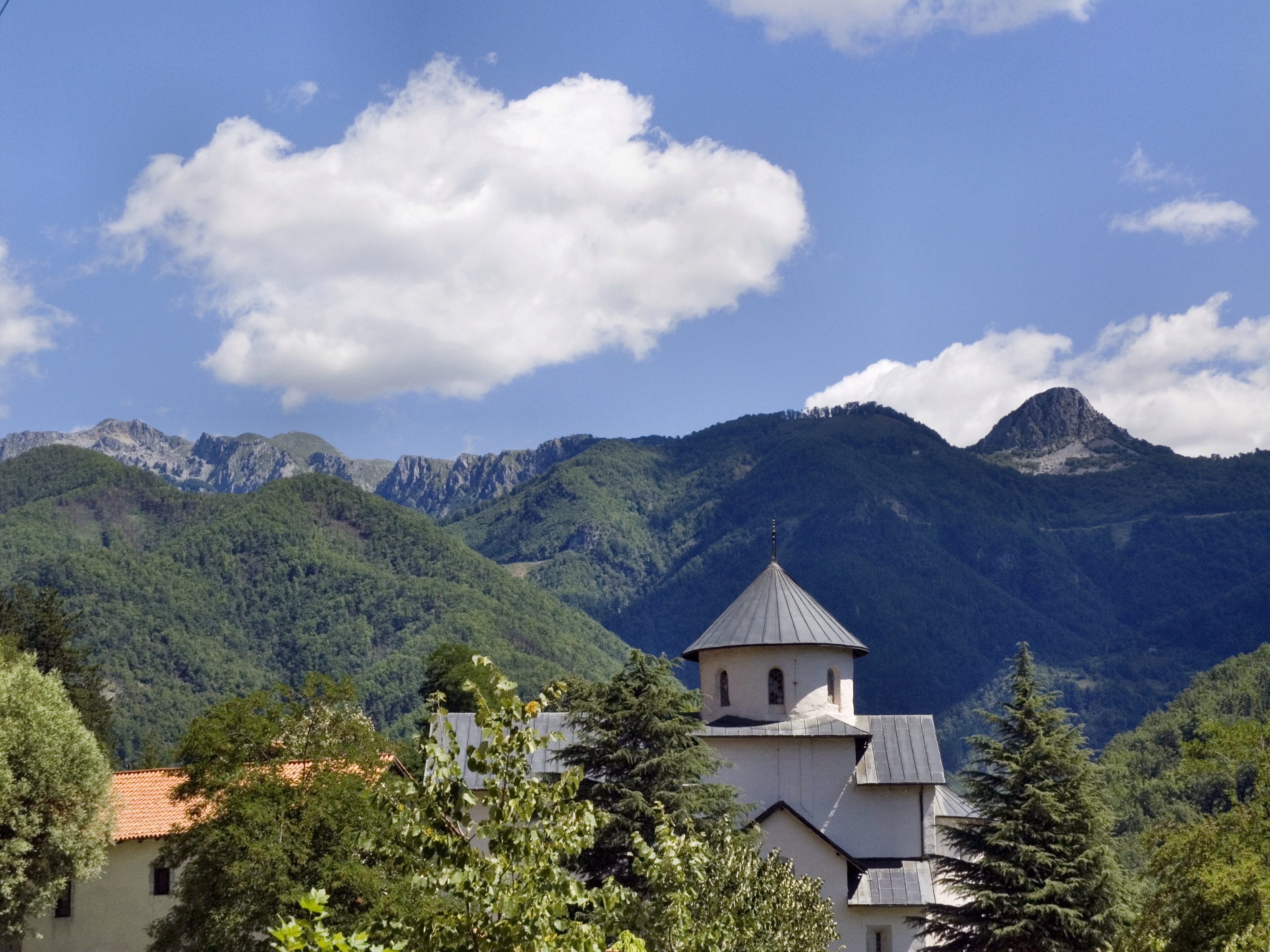 Черногория. Монастырь Морача. Церковь Успения Богоматери